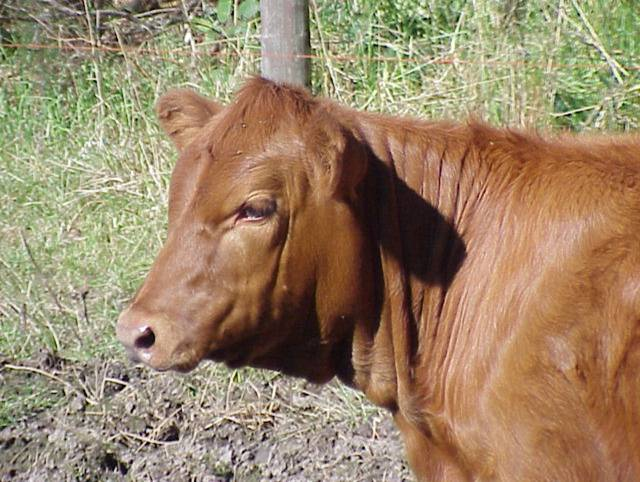 Self Made